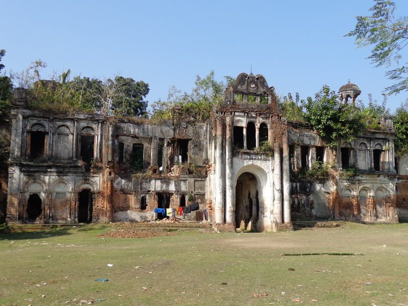 এটা কানাইপুর সিকদার বাড়ি, এই জমিদারদের অন্যায়ের বিরুদ্ধেই ১৮১৮ সালে ফরিদপুরে ফরায়েজি আন্দোলনের সূচনা হয়েছিল যার নেতৃত্বদান করেছিলেন হাজী শরিয়তুল্লাহ এবং পরবর্তিতে তার পুত্র দুদু মিয়া।